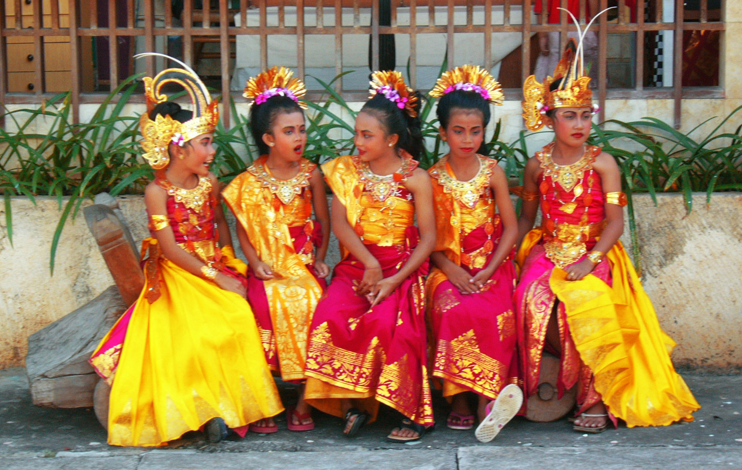 Balinese Culture